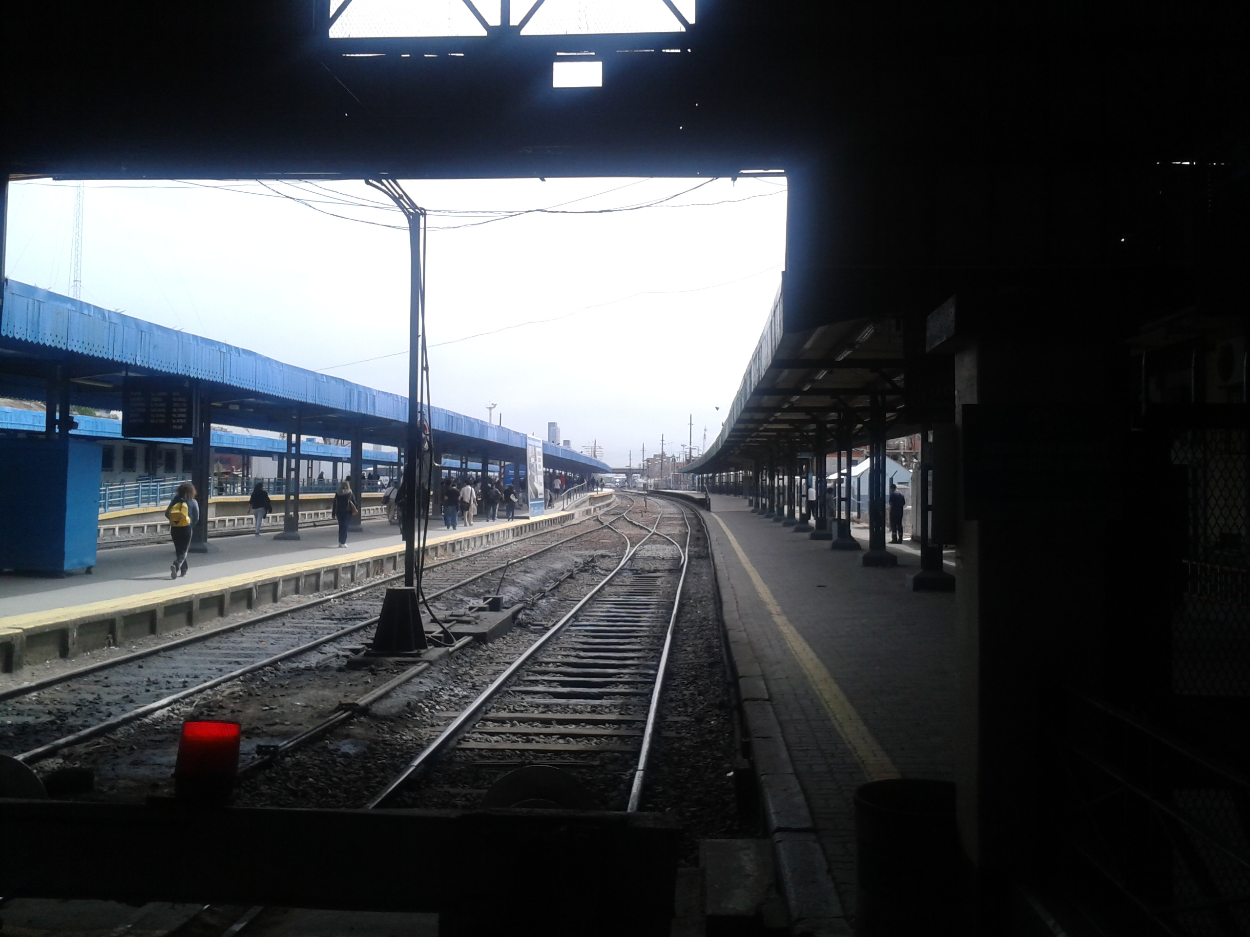 Vista de las vías 4 y 5